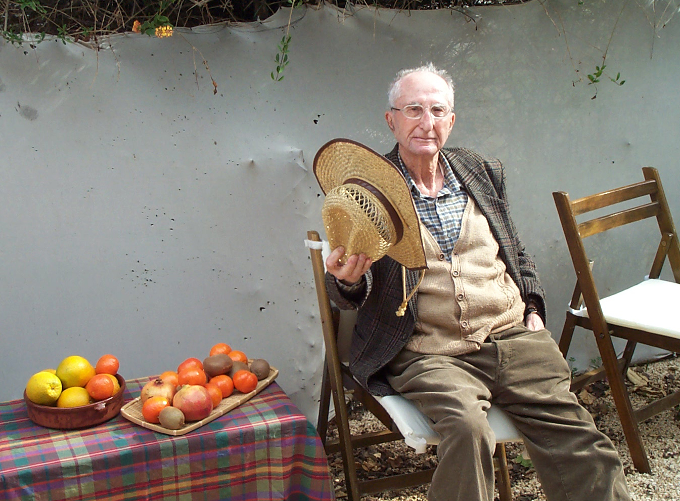 אליהו בנימיני, מגבעת ופירות העונה, בצילום מאחרית ימיו, רמת השרון, 2001